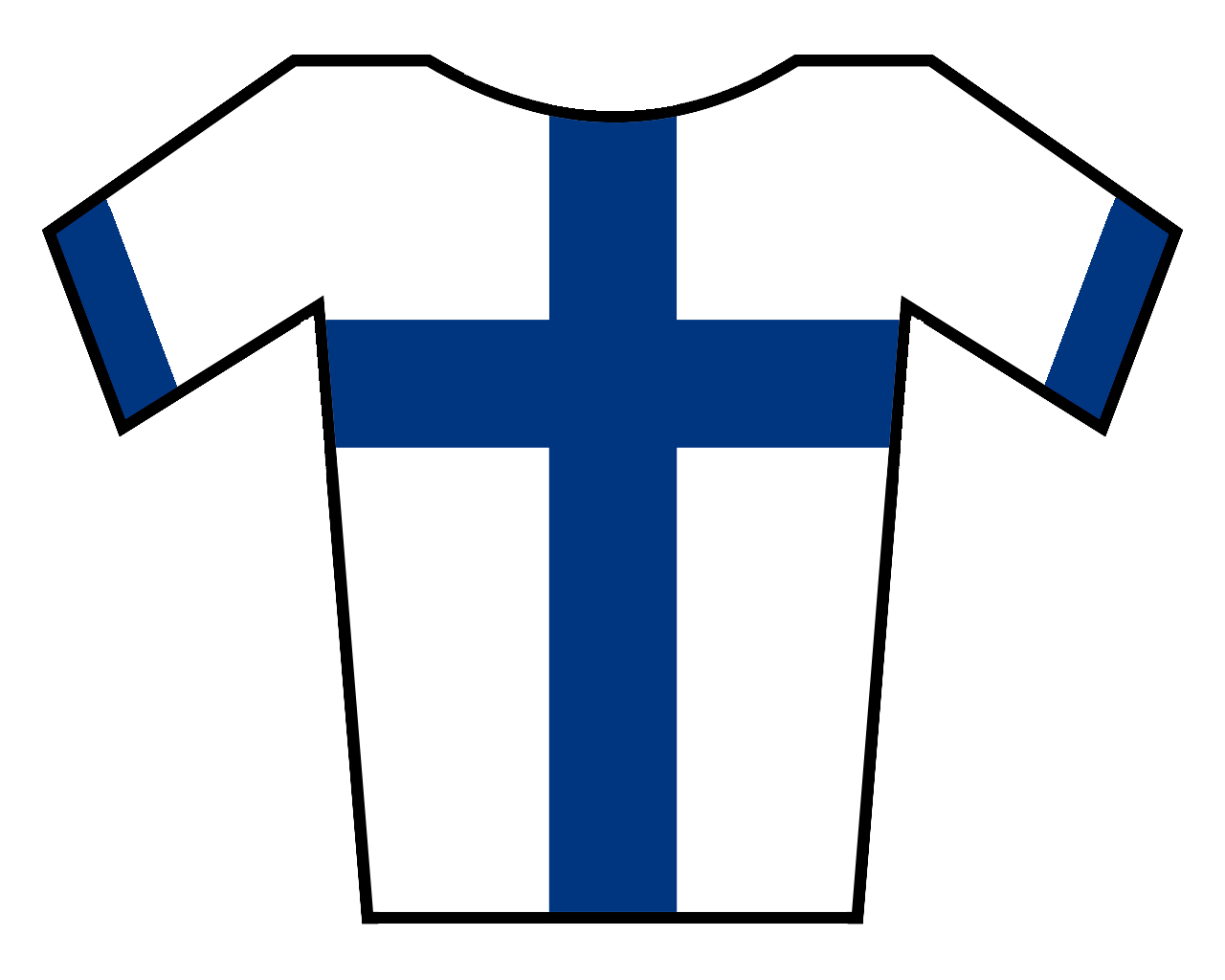 Maillot de Finlandia